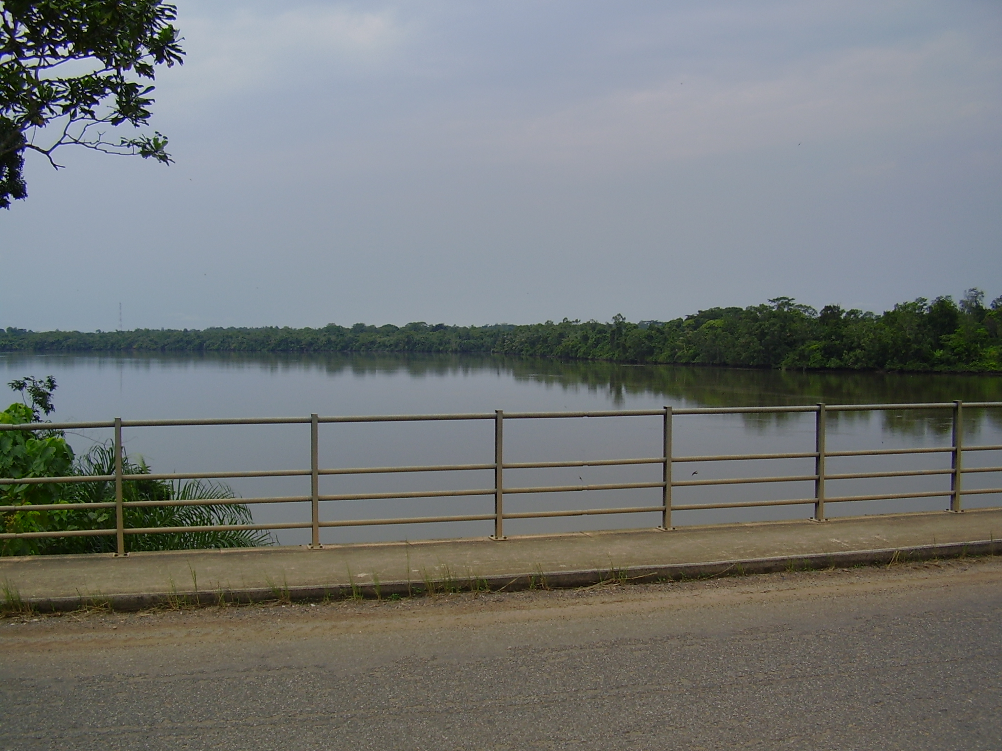 Le fleuve sous la route de Libreville à Lambaréné